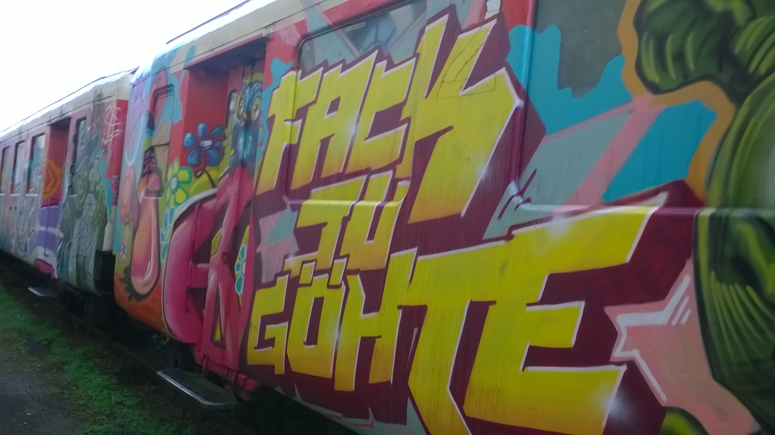 Wholetrain (Graffiti) aus dem Film „Fack ju Göhte“ im Bahnbetriebswerk Augsburg